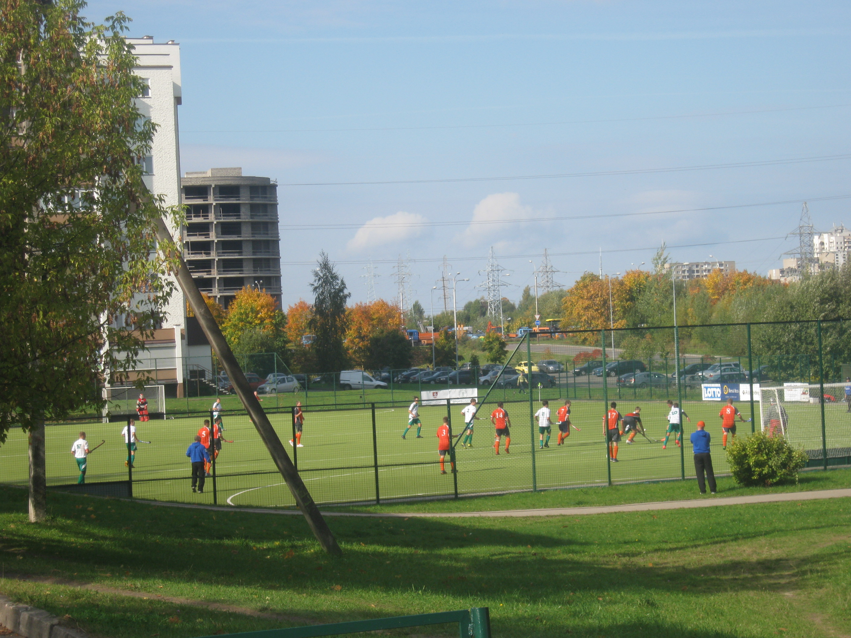 Čiobiškio g. 16. Vienas iš trijų žolės riedulio stadionų Lietuvoje. Vilniaus SŽK „Žuvėdra-Tauras“ – Širvintų „Inta-Baltic-Champingnons“ Lietuvos čempionatas